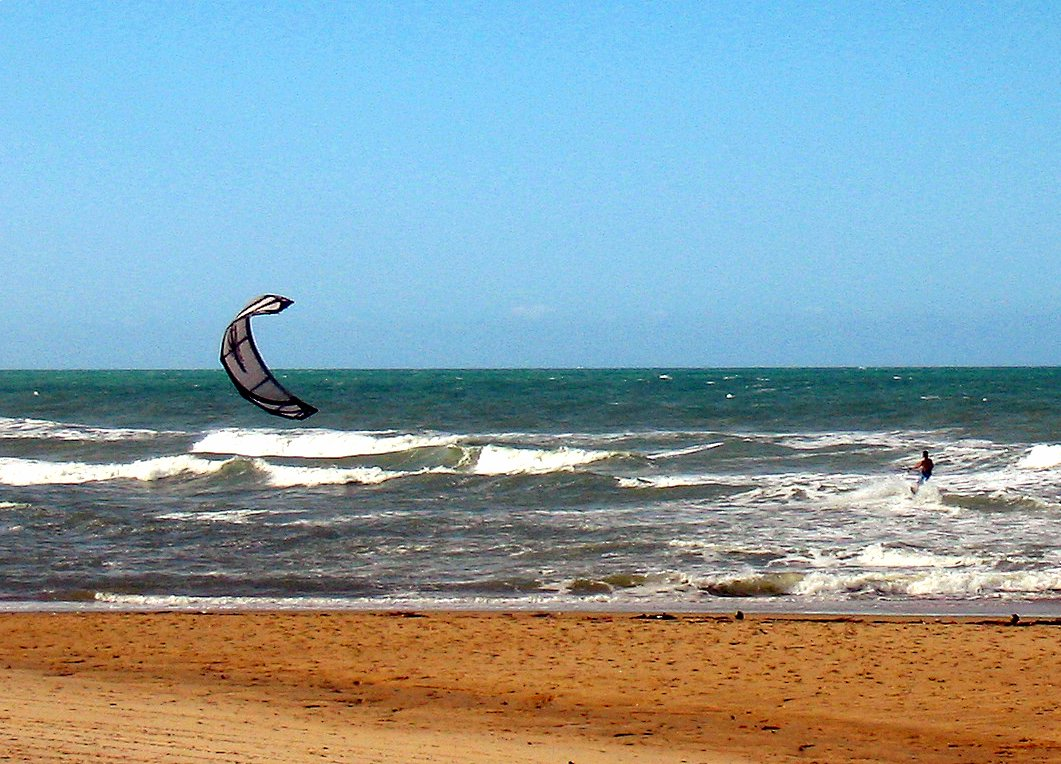 Kitesurfista na Praia do Futuro em Fortaleza